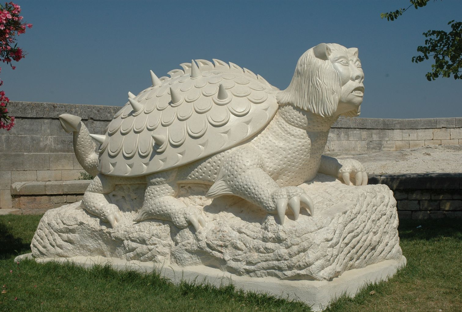 Sculpture de Pascal Demaumont à l'initiative de Christian Guiot, chevalier de la Tarasque. Inaugurée le 23 juin 2005.